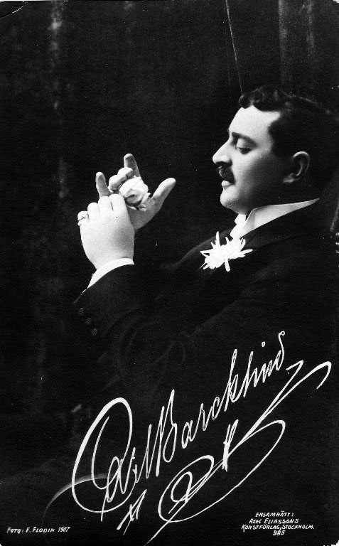 Carl Barcklind